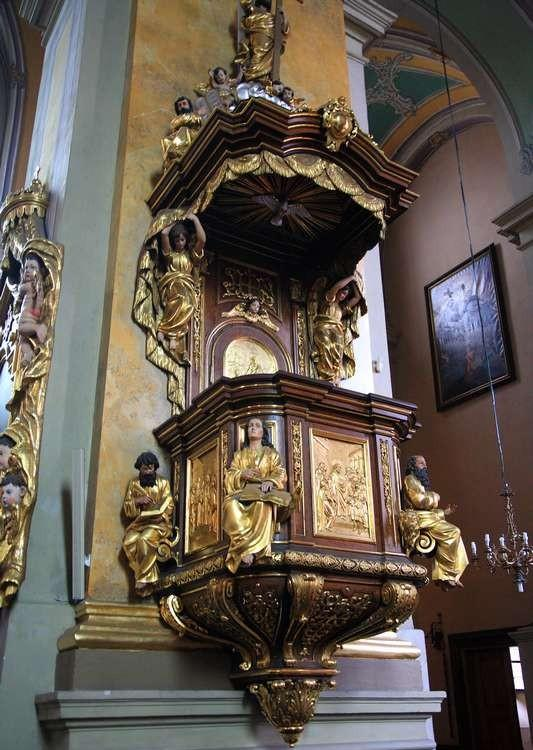 Katedra w Przemyślu, ambona